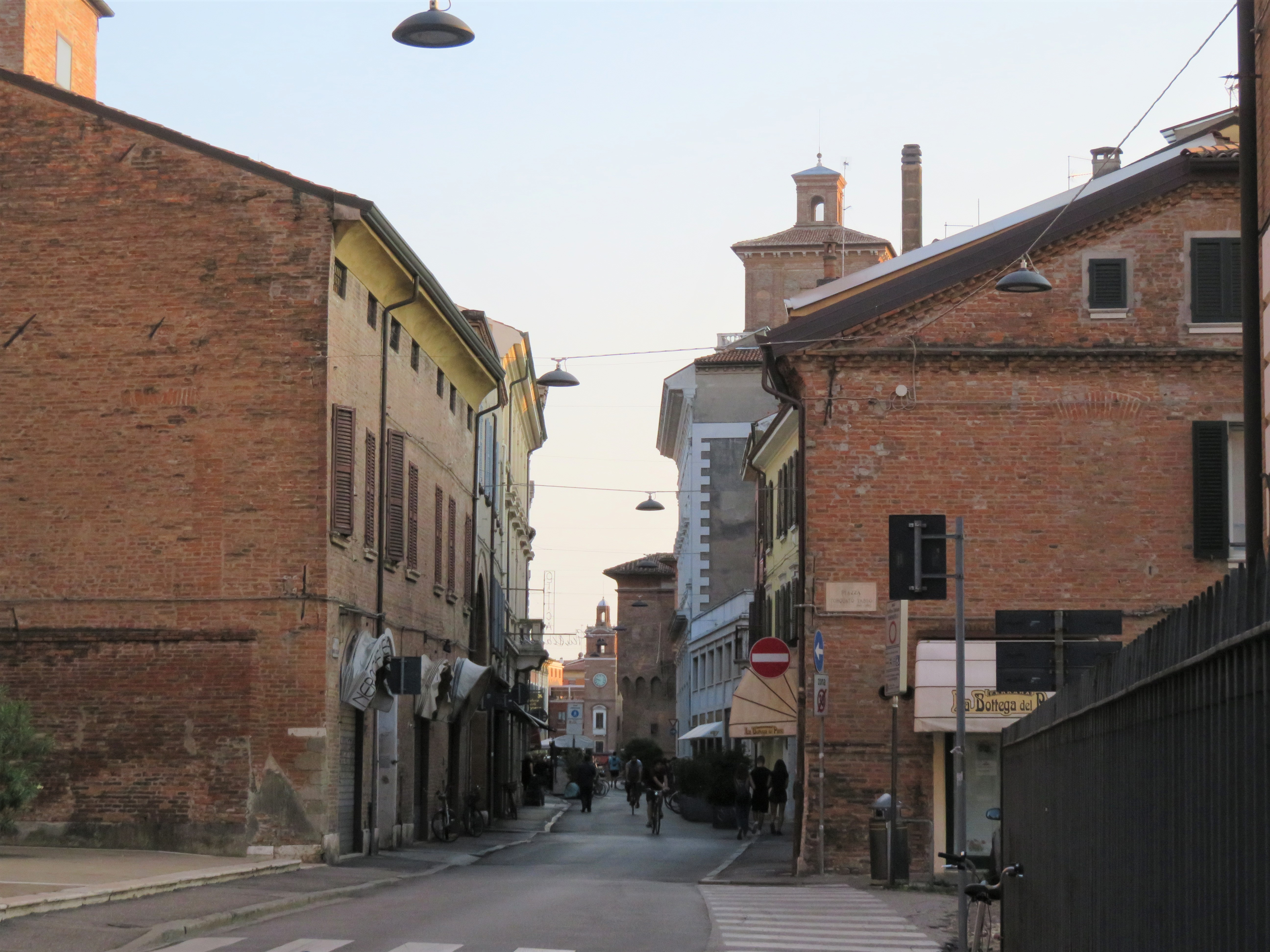 Via Borgoleoni, o via Borgo dei Leoni, Ferrara. Piazza Torquato Tasso